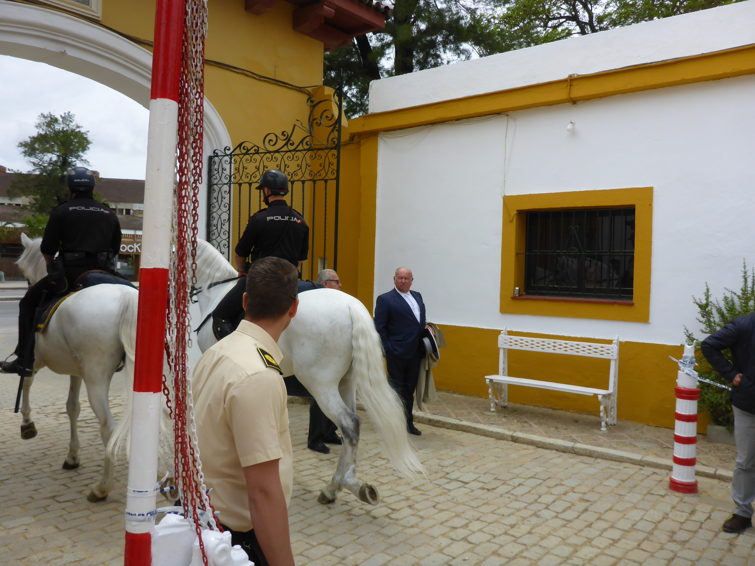 Policía nacional montada y Álvaro Domecq Romero